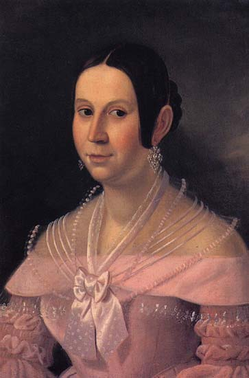 Перлова Агриппина Степановна (купчиха) Автор: Дубровин П. А. Источник иллюстрации: Музей В А. Тропинина и московских художников его времени